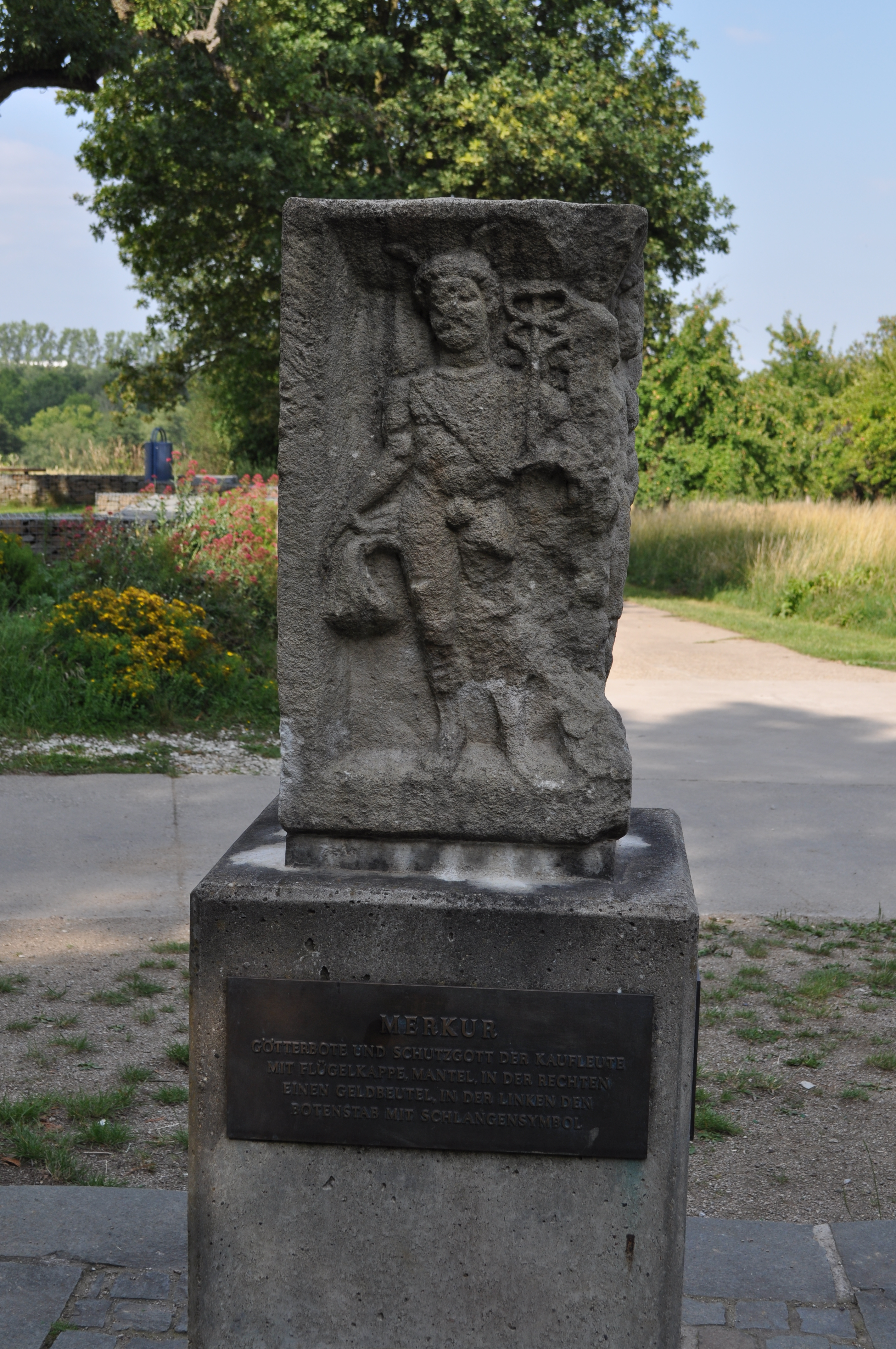 Darstellung des Merkur auf dem Viergötterstein in Schwalbach.